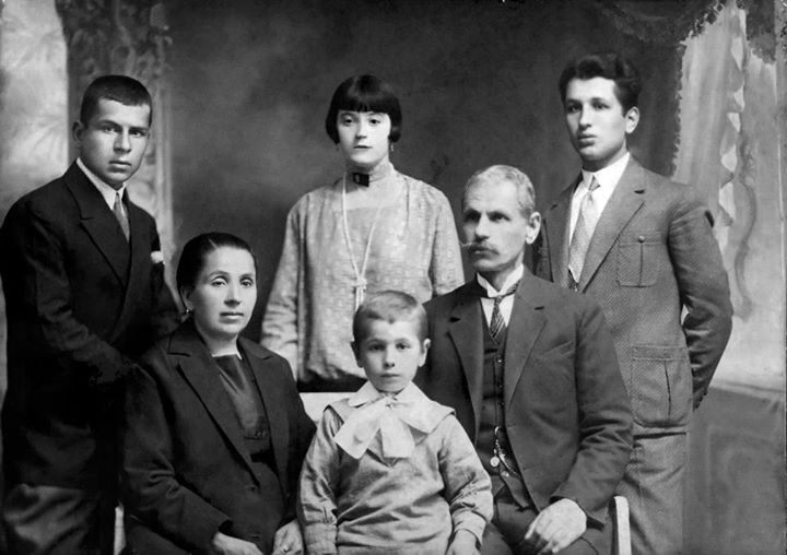 Gorgi Zografski so soprugata Rosa Zografska, sinot Jordan, Jelena Zografska i Jovan Zografski (roditeli na kompozitorot Tomislav Zografski) i najmladiot sin Danco Zografski (snimeno vo Veles vo 1928 godina)